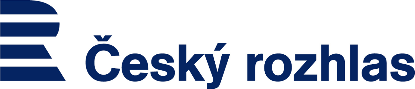 Nové logo Českého rozhlasu